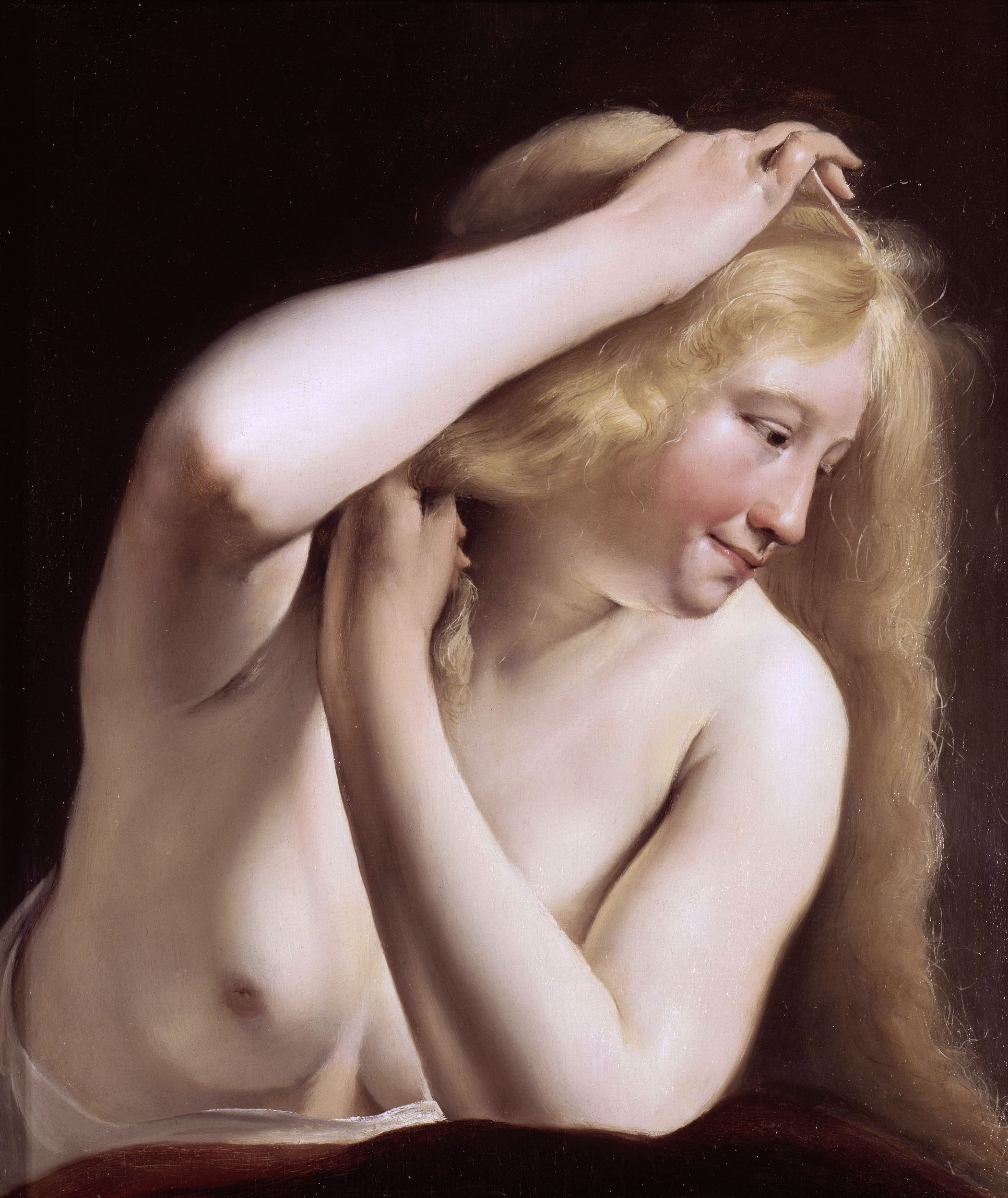 Jeune femme vue en buste, se peignant. Typique étude de nu, a la fois idéale (sorte de nymphe antique) et vériste, entre histoire et genre.